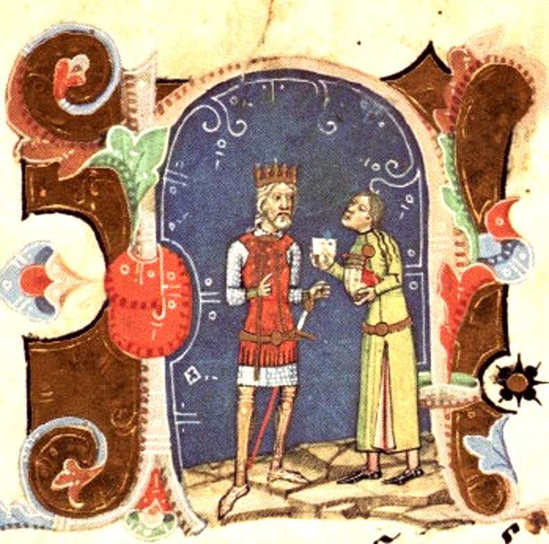 Károly Róbert magyar király és Bazarád (Basrab) havasalföldi vajda követe, a Képes krónika miniatúrája a krónika 143. lapján. Bazarád tisztességes követeket küldött a királyhoz, és ezt üzente: "Fáradoztál, uram királyom, a sereggyűjtéssel: ezért a fáradságodért hétezer ezüstmárka kártérítést adok. Békességgel átadom neked Szörényt is mind a hozzávalókkal, amelyet erőhatalommal foglaltál el; ezenfelül hűségesen megfizetem minden esztendőben az adót, amivel koronádnak tartozom, továbbá pénzemen és költségemen egyik fiamat küldöm udvarodba, szolgálatodra: csak térj vissza békével, és ne döntsed veszedelembe embereidet; mert ha tovább jöttök, el nem kerülitek a veszedelmet." Ennek hallatára fennhéjázó elmével ily szavakat mondott a király a követeknek: "Mondjátok meg Bazarádnak: ő az én juhaim pásztora; szakállánál fogva húzom ki búvóhelyéről!"